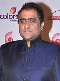 Kunal Ganjawala at GIMA's tribute to Jagjit Singh